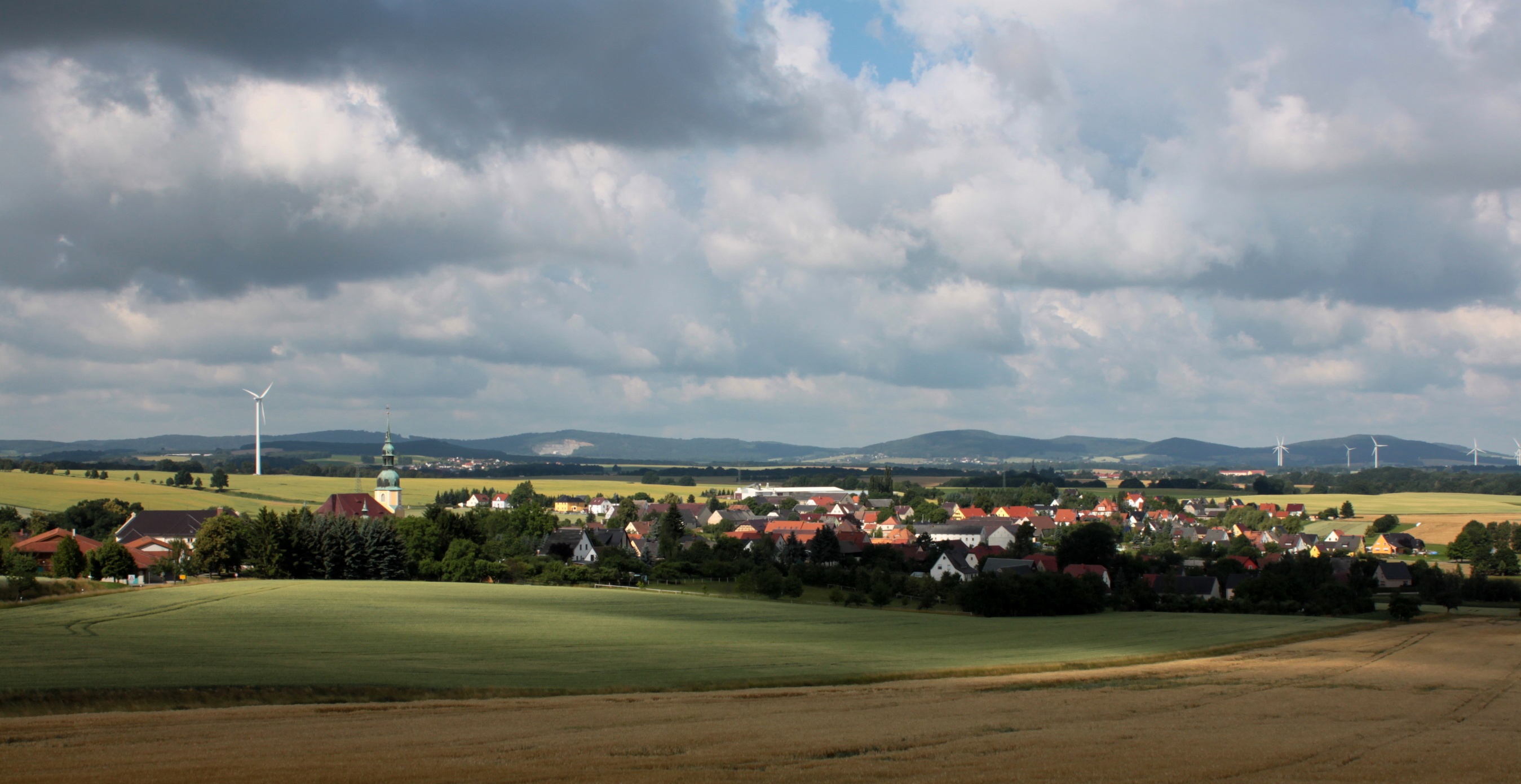 Ansicht von Crostwitz vom Galgenberg aus. Hornjoserbsce: Pohlad Chrósćic ze Šibjeńcy.